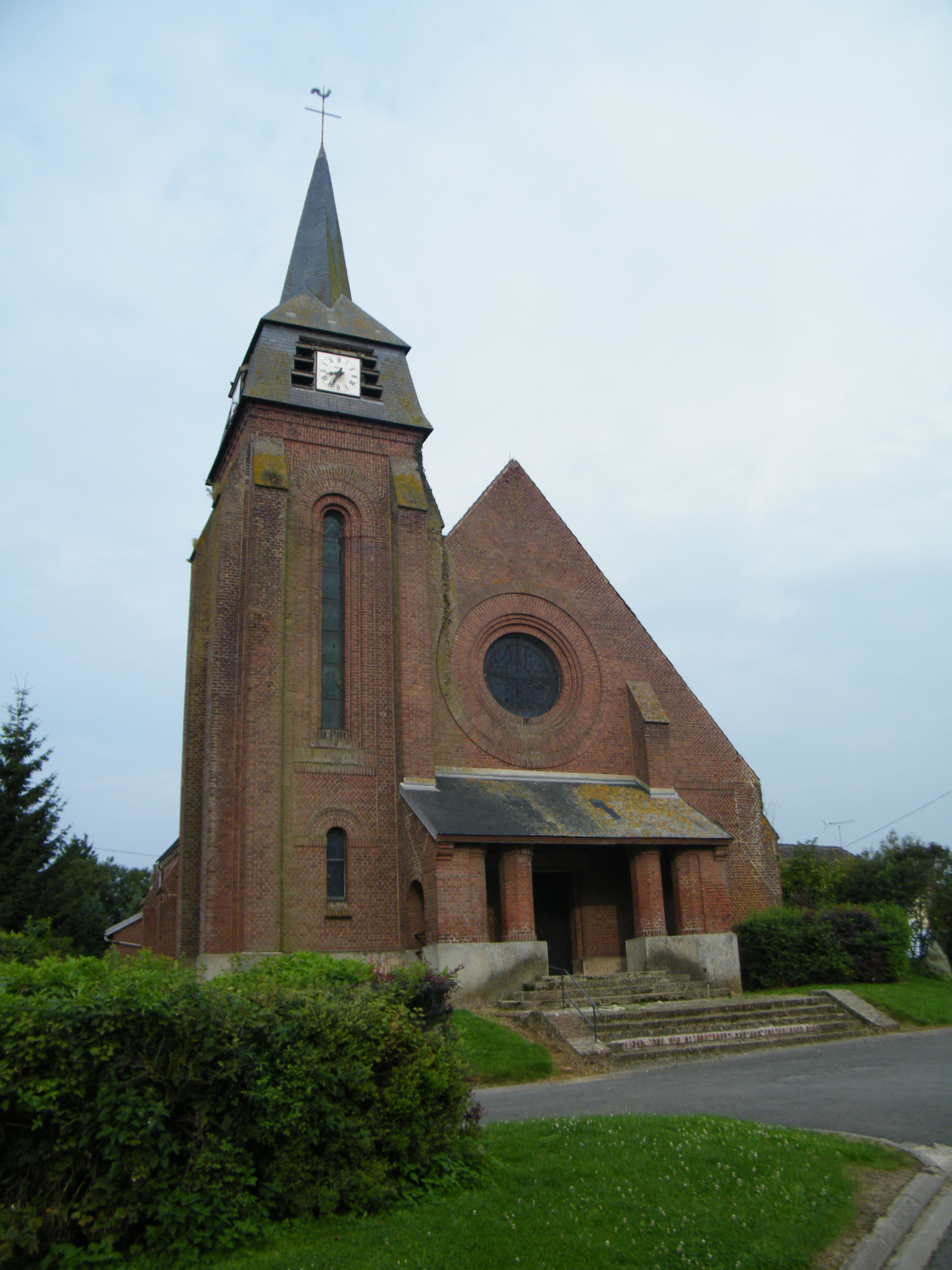 Eglise Saint-Fursy de Pys, Somme, France.